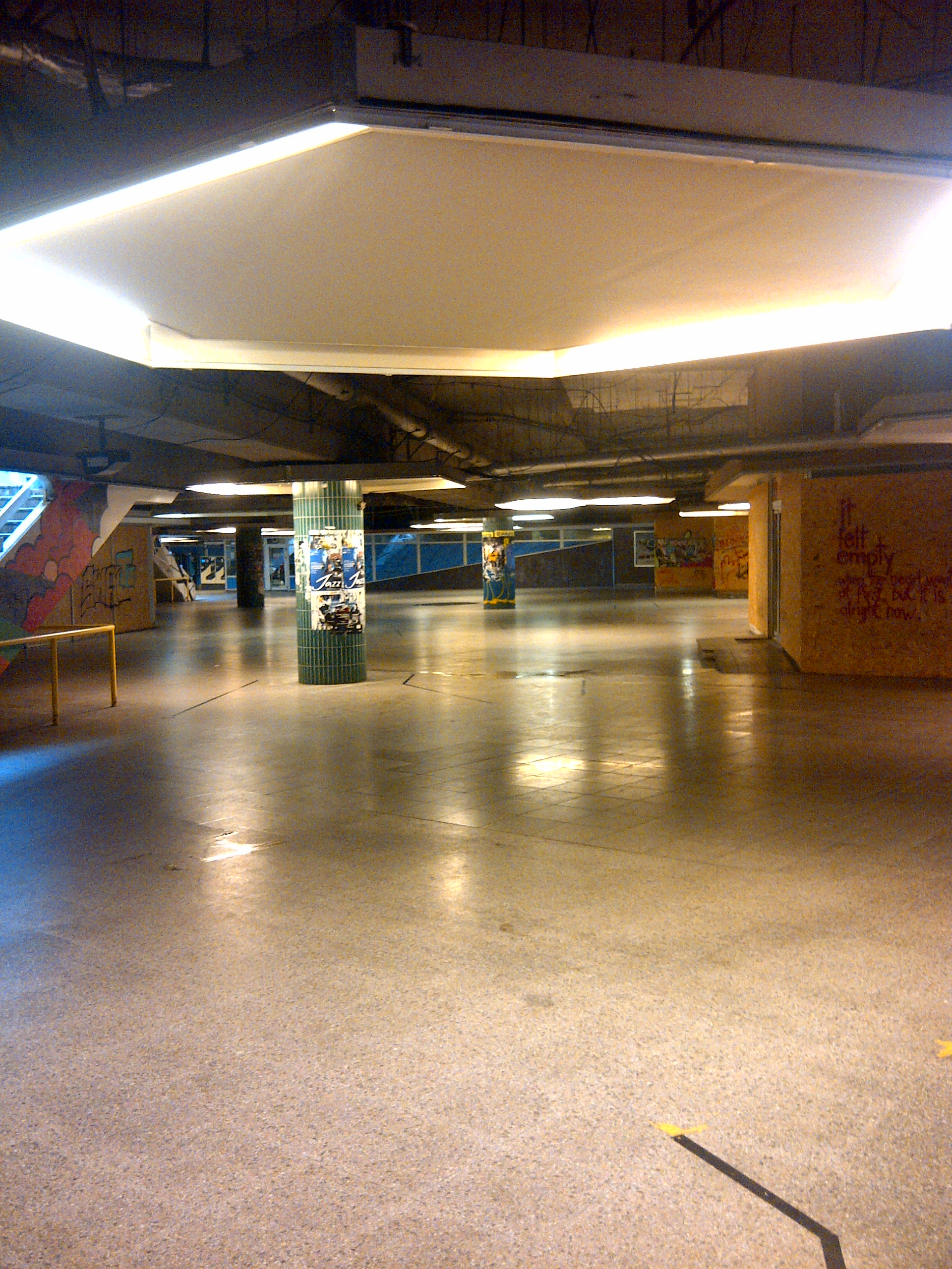 Passage souterrain et ancienne galerie marchande délabrés du Centre Aldringen (place Émile Hamilius) peu avant la fermeture définitive.